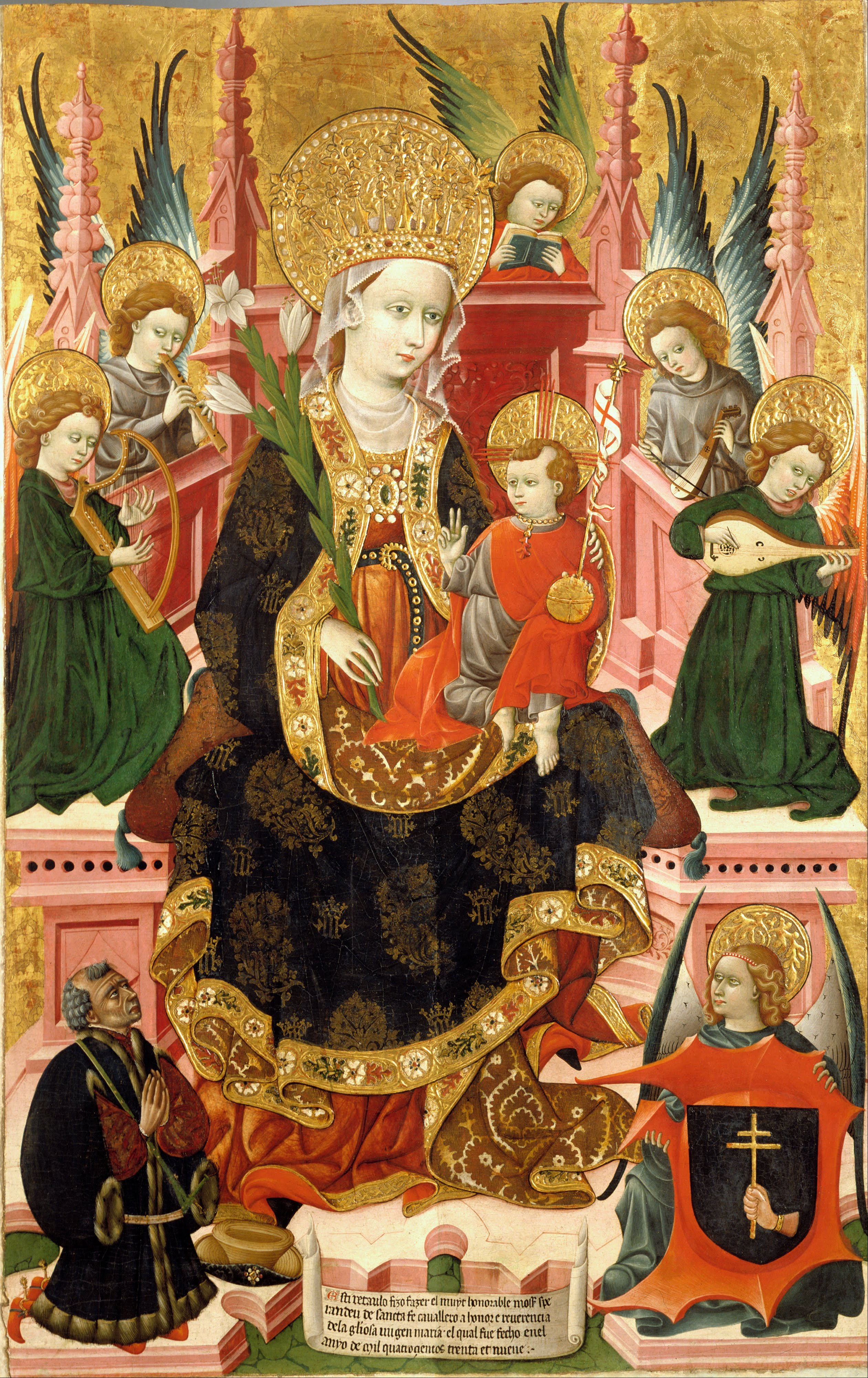 Esta obra es el panel central de un retablo que estuvo dedicado a la Virgen María y en el que la madre de Dios aparecía entronizada y con el niño Jesús sentado en su rodilla izquierda. A la derecha de la Virgen aparece arrodillado, y en actitud orante, el caballero Mosén Sperandeu de Santa Fe, que está vestido a la moda propia de su época y da nombre a la tabla.